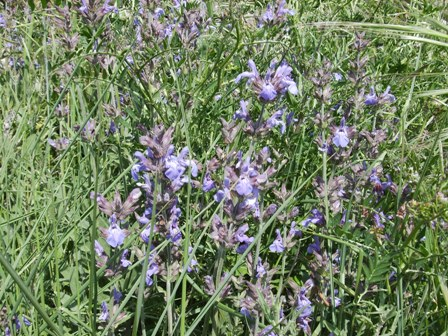 Image:Herba i sàlvia_12_maig__2006_081.jpg